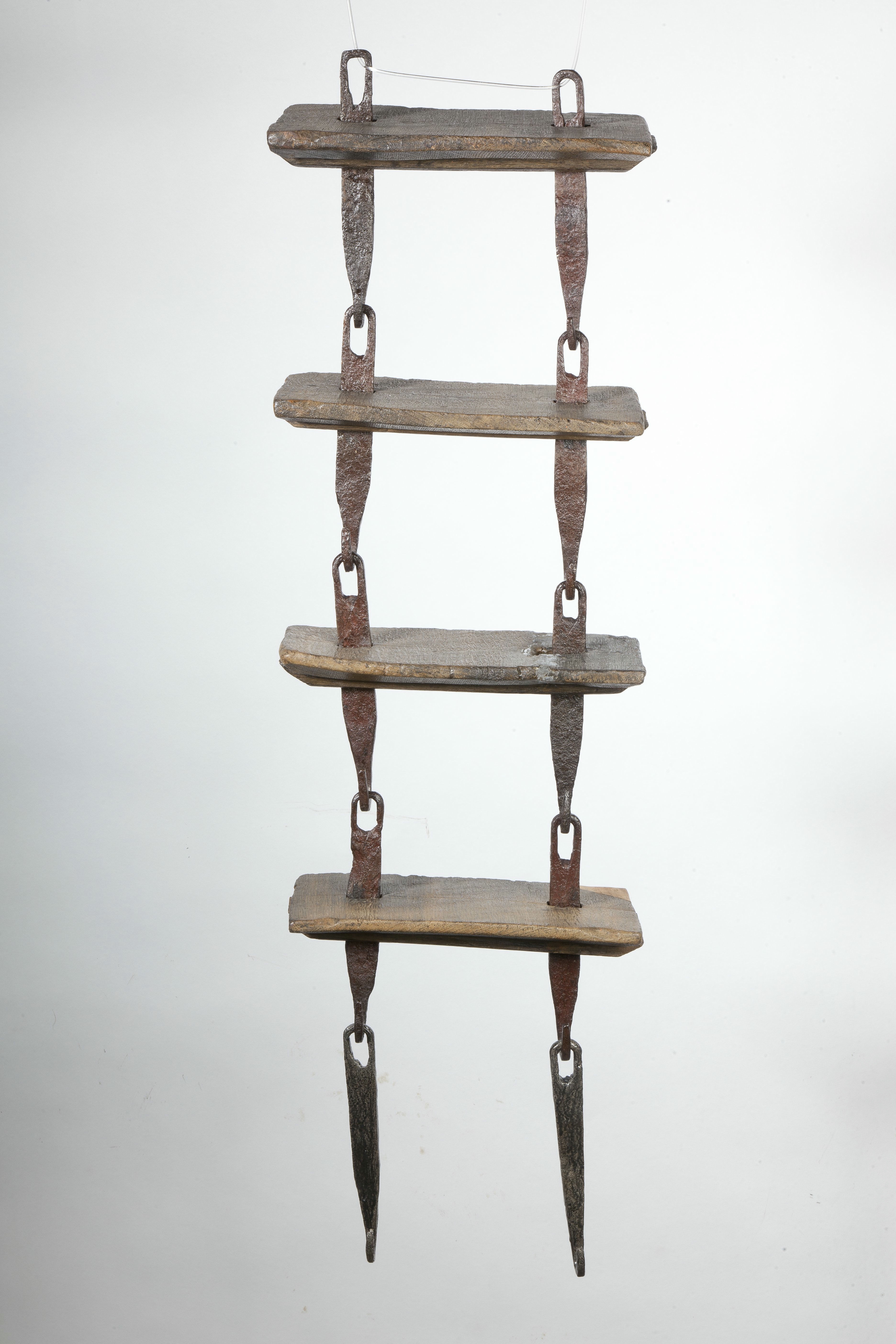 ladder, ook wel valreep genaamd, met vijf (losse) treden -één ontbreekt- (a t/m e);elke trede bestaat uit een rechthoekig plankje, waarvan de onderste helft van dikte aan de onderkant schuin is afgewerkt langs alle vier zijden; in de lengte van het plankje is aan de onderzijde een Objectnummer: [MA]NE81-136Materiaal: divers, hout